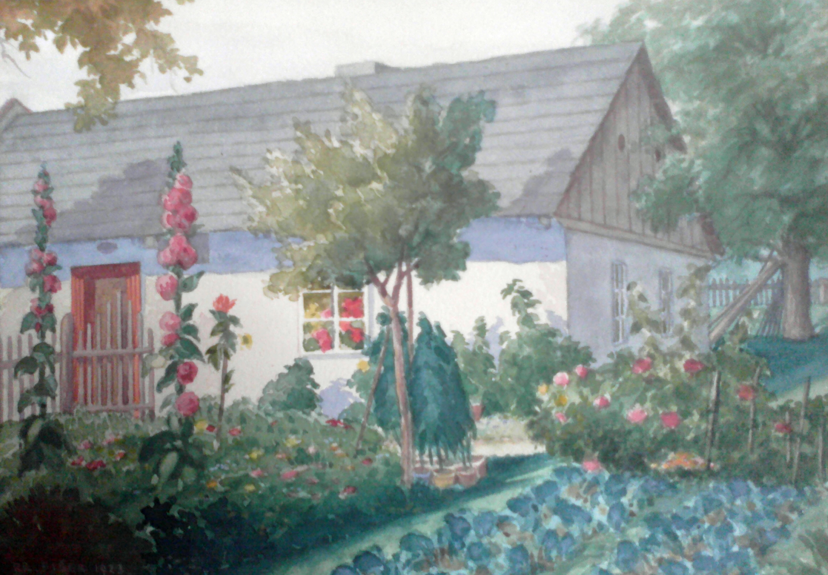 rodný dům